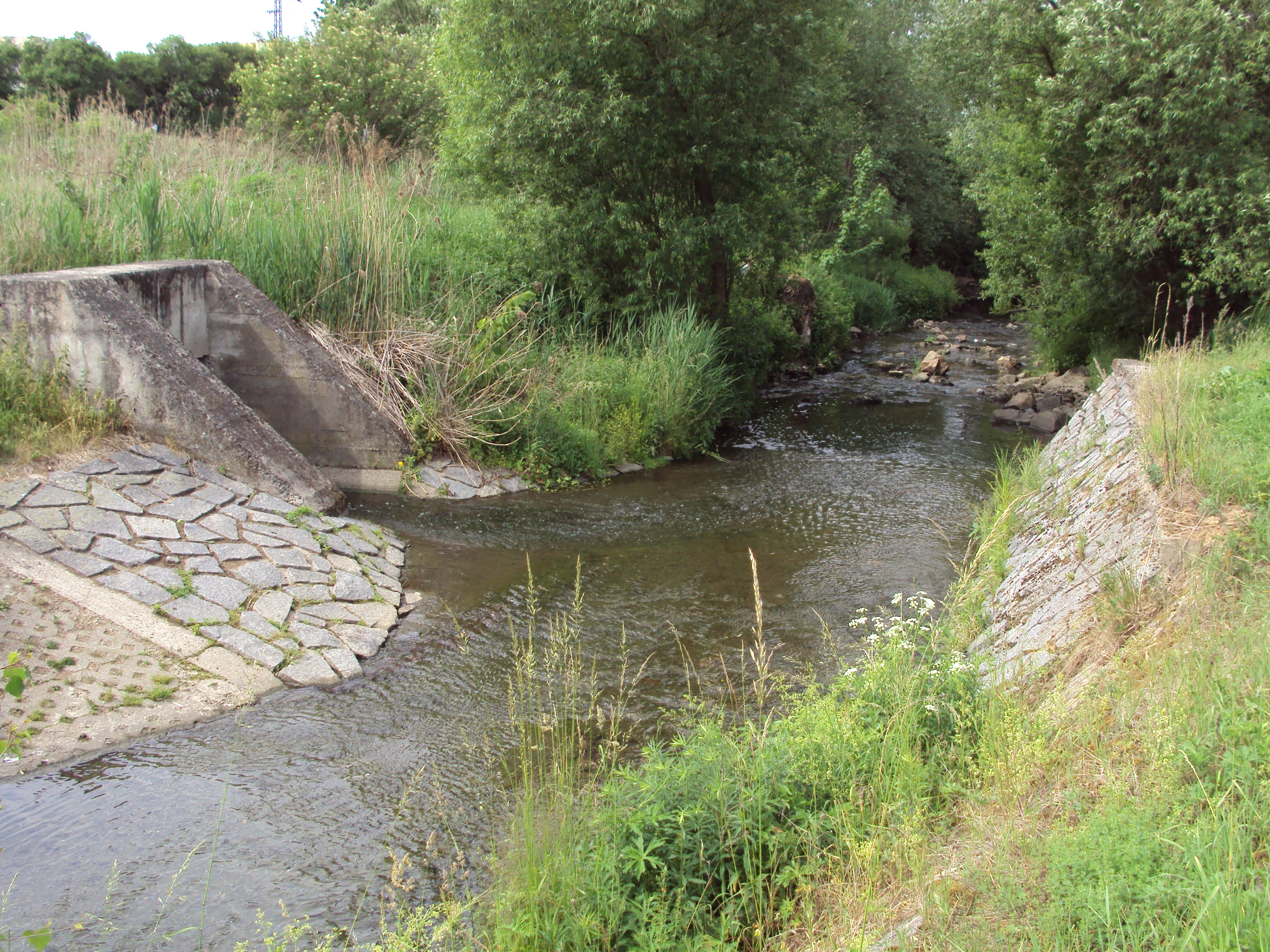 benešovský potok s výtokem z nedaleké čističky